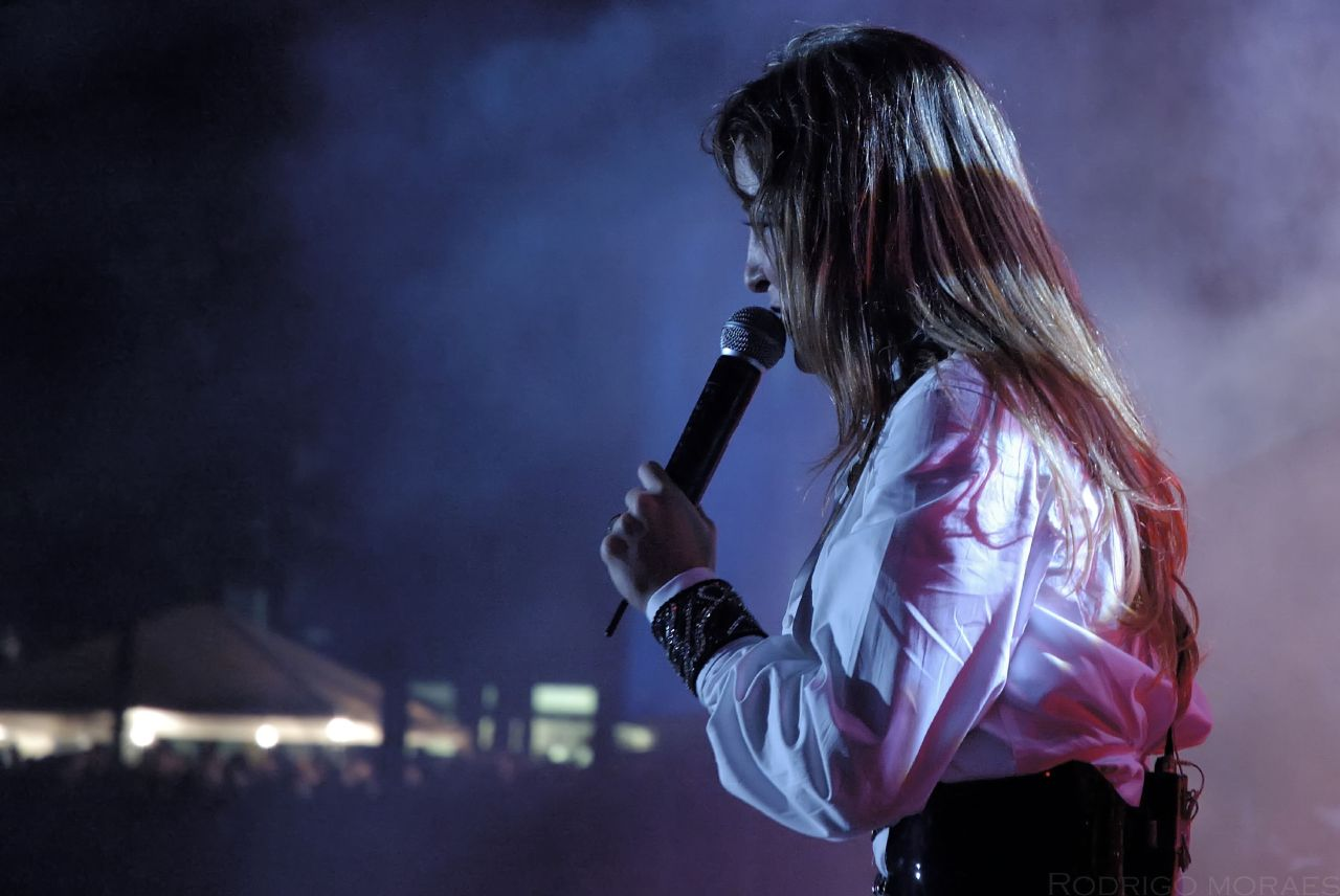 Cláudia Leite dos Babado Novo na Festa do Peão.